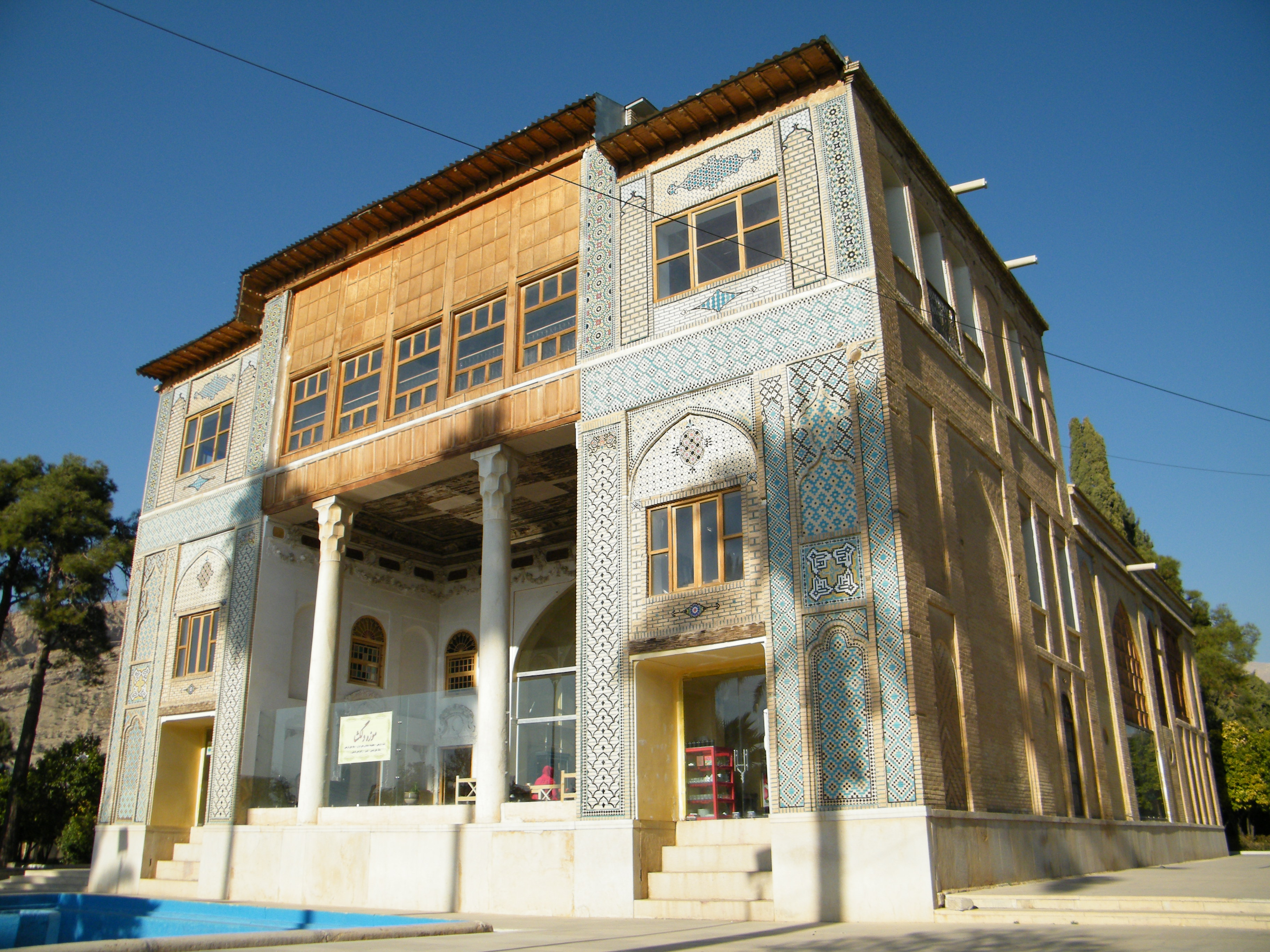 شيراز باغ دلگشا